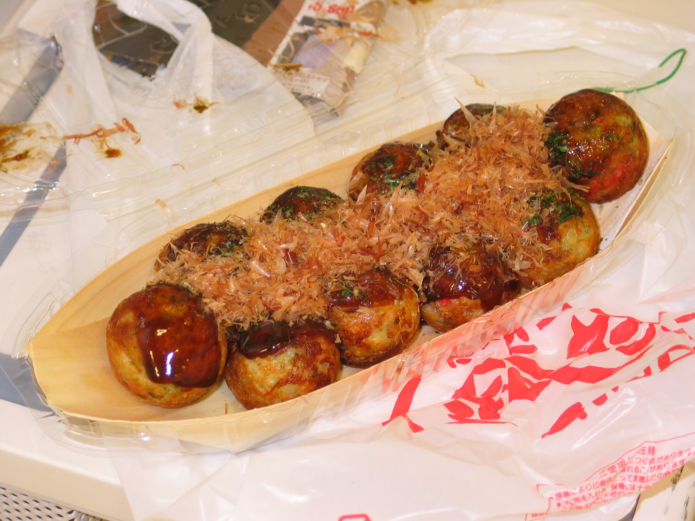 たこ焼き - Takoyaki.